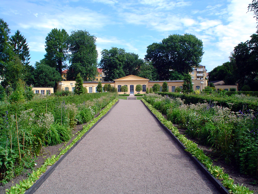 Linné Garden in Uppsala